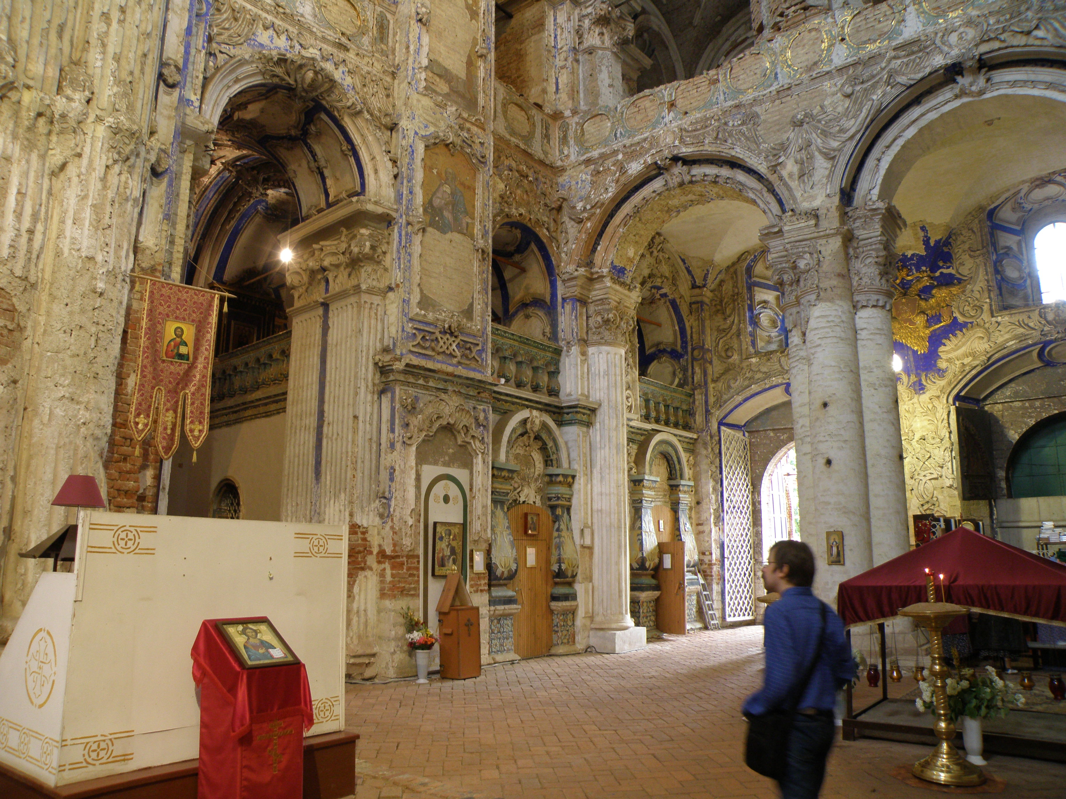 Голгофа Воскресенского собора Новоиерусалимского монастыря (второй ярус, окруженный изразцовым парапетом) и вход в церковь Усекновения главы Иоанна Предтечи (под Голгофой).